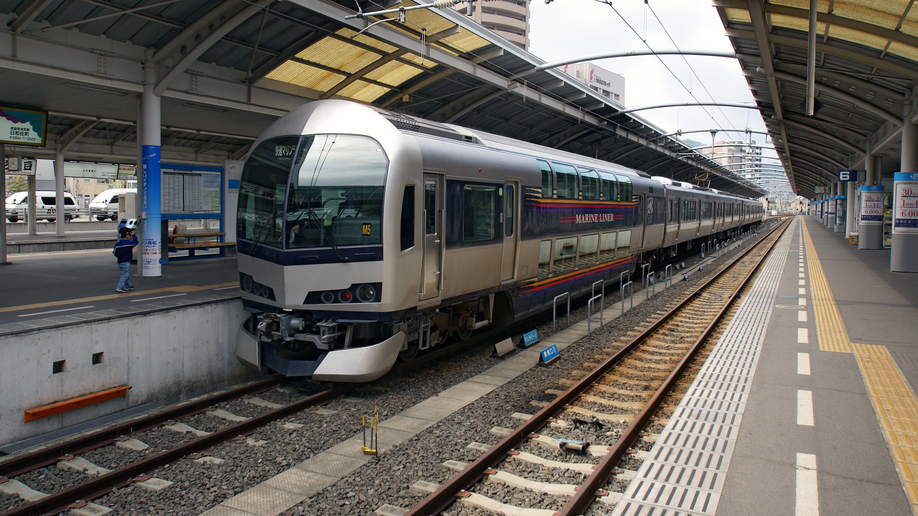 Rapid Service Marine Liner at Takamatsu Station in Takamatsu, Kagawa, Japan